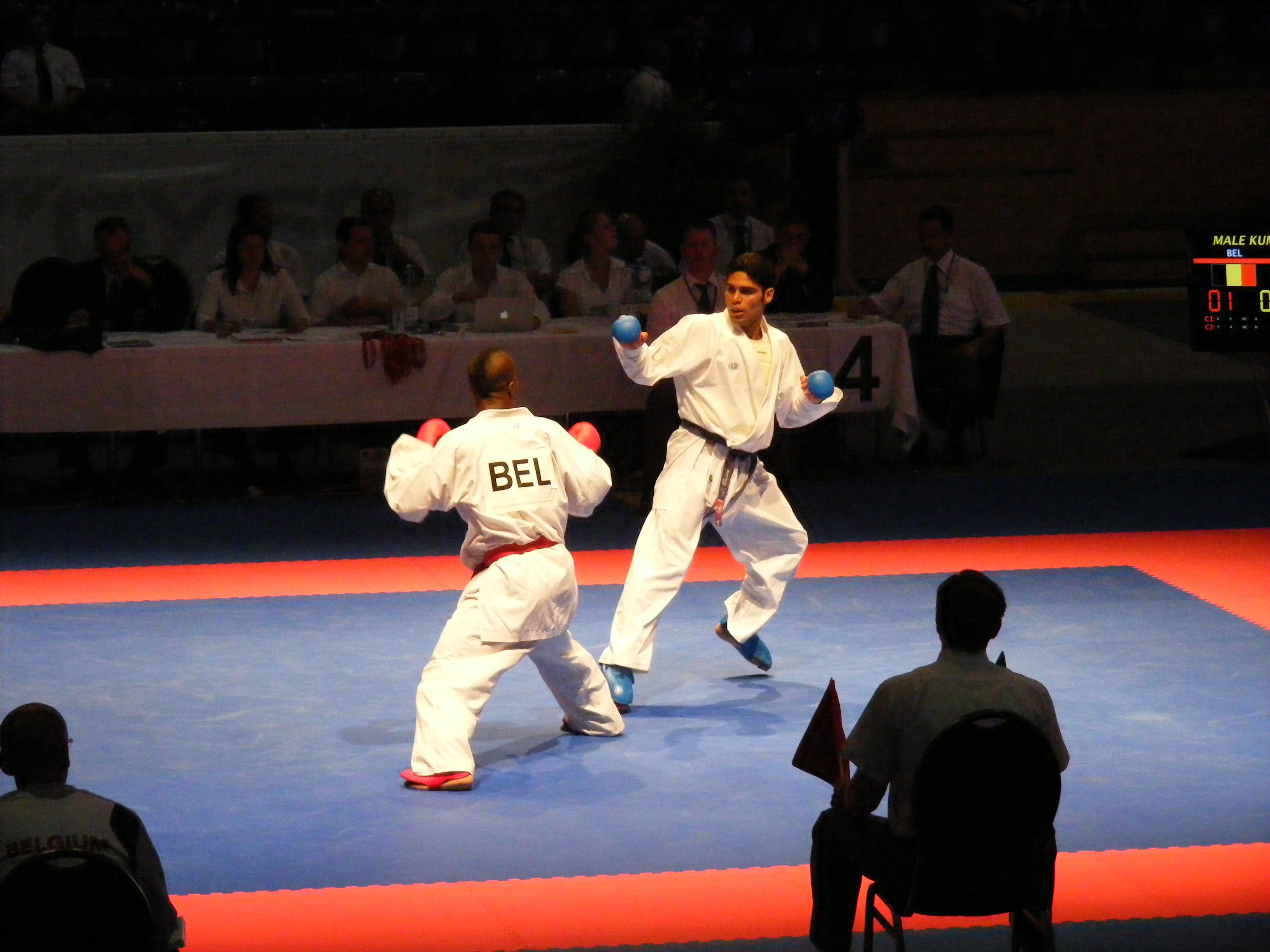 Karate Kumiteentscheidung der EM 2011 (ITA) vs. (BEL)